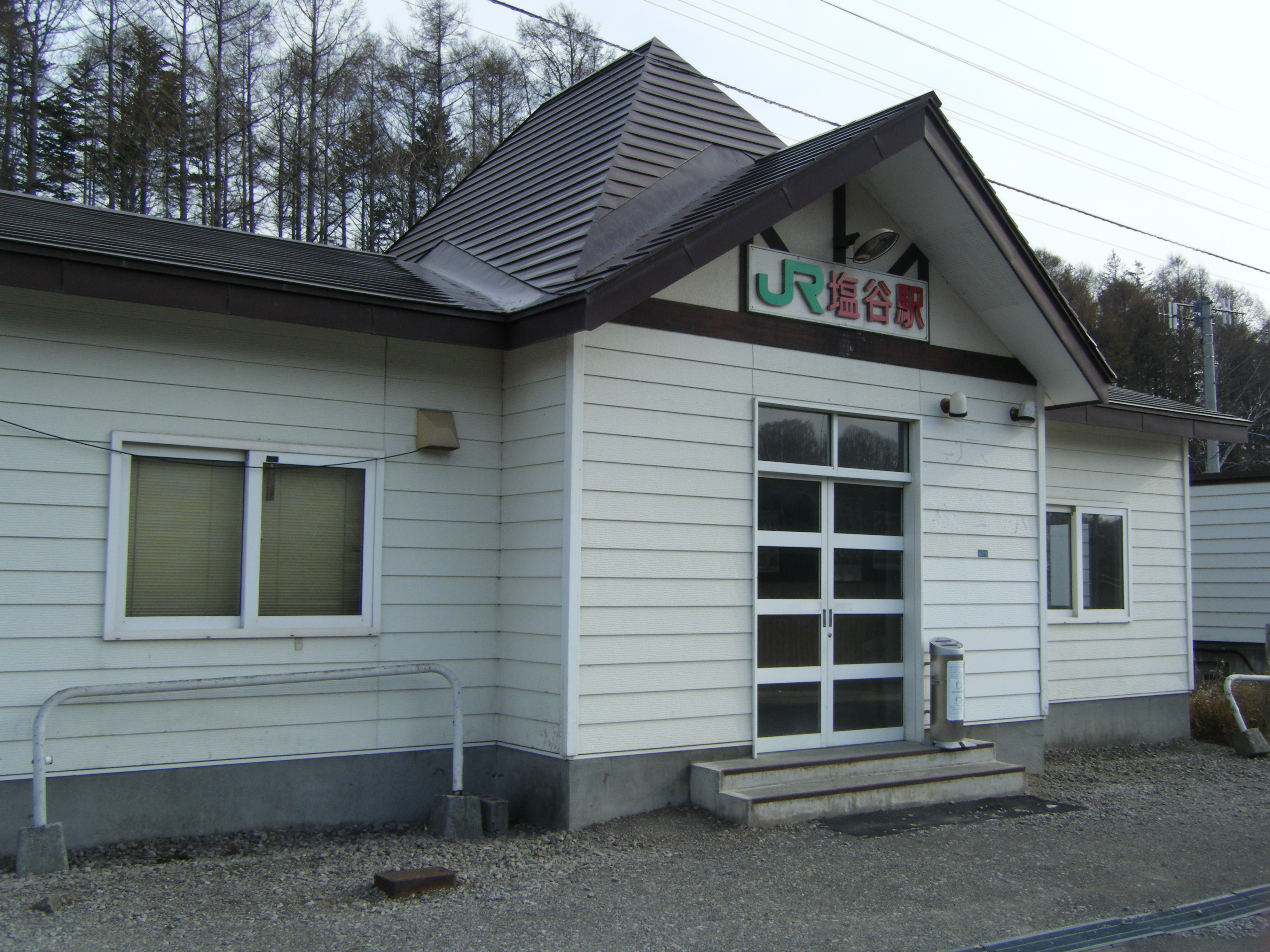 塩谷駅外観（JR北海道 函館本線）